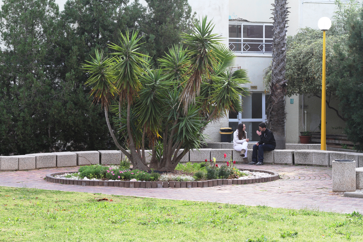 רקע בניין בית הספר בכפר הנוער